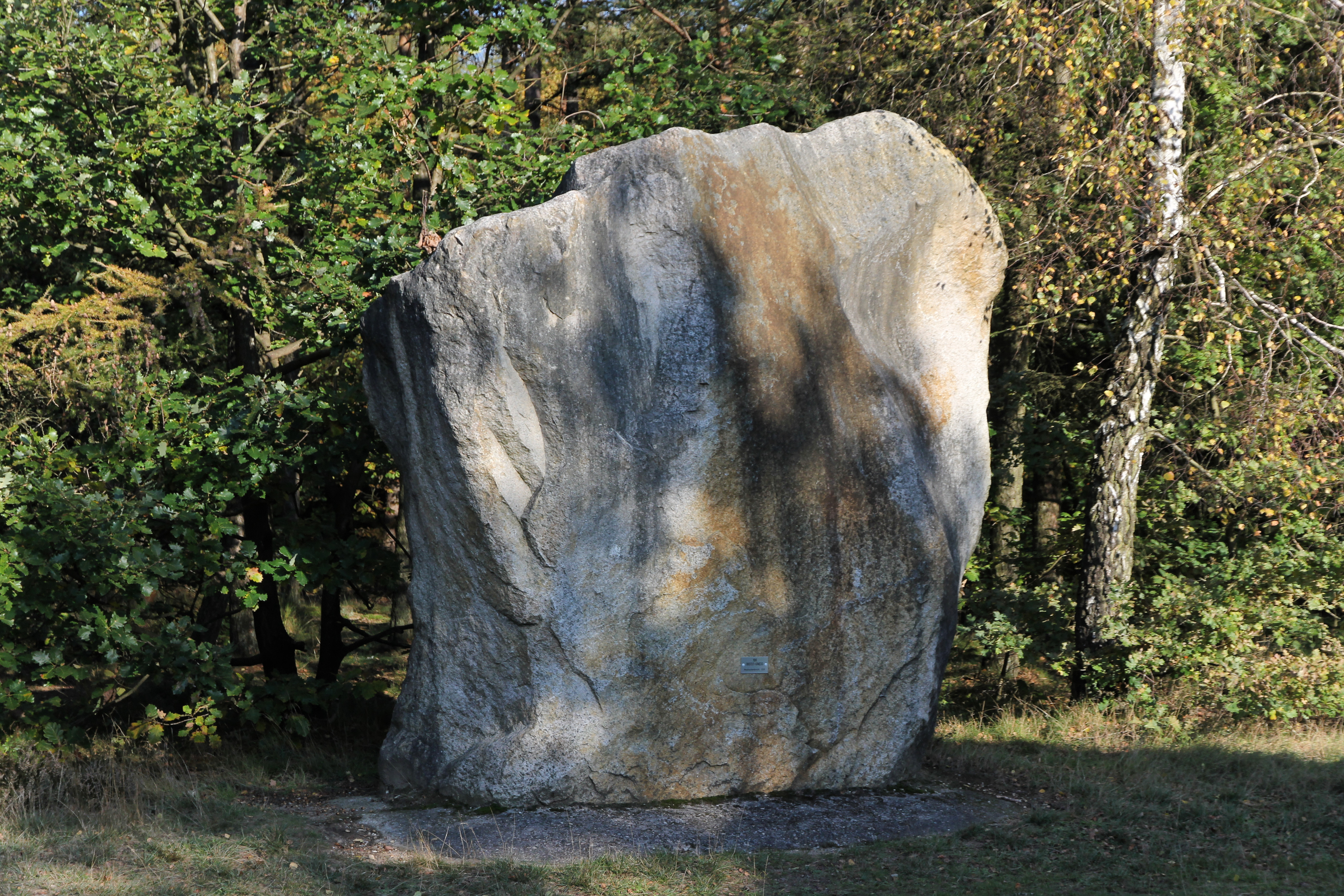 Findling Steingarten Lamstedt